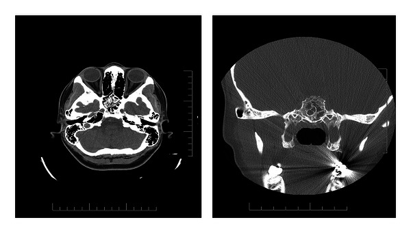 Lipoma intraosseo dello sfenoide. L'immagine TC evidenzia una lesione osteolitica a livello del seno sfenoidale con calcificazioni al centro e con una matrice con densità compresa fra -30 e -90 HU, indice di contenuto lipidico. Tratto da Jamrozik et al. 2013 Intraosseous Lipoma of the Sphenoid: A Case Study. Case Reports in Neurological Medicine CC-BY 3.0 License